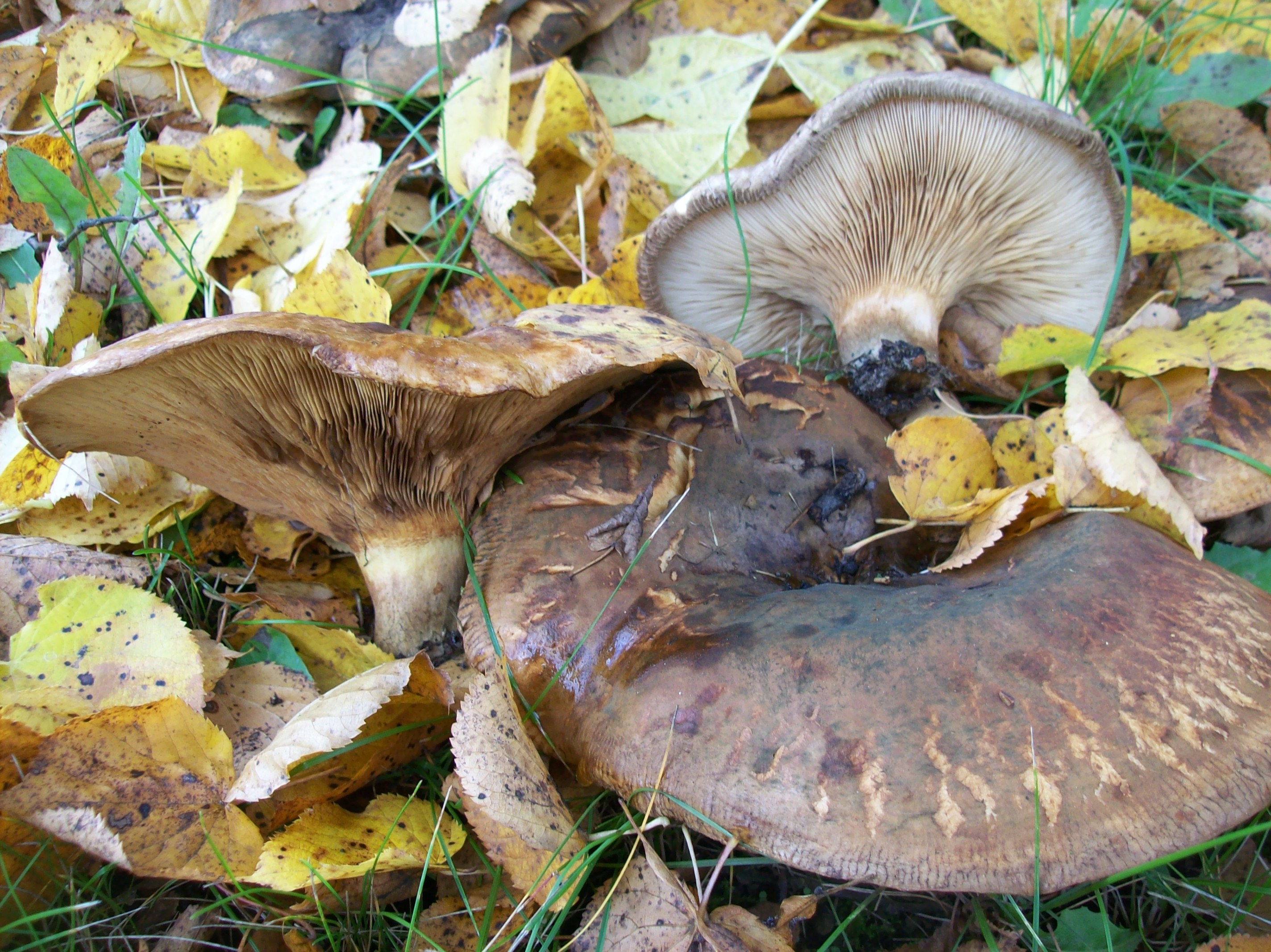 Der Große Krempling auf einer Wiese unter Linden